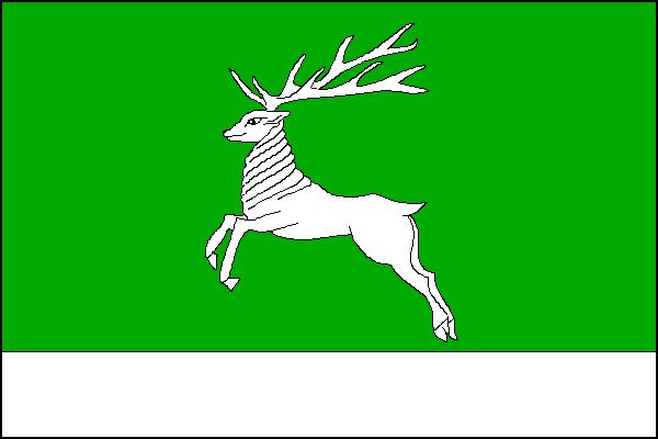 Vlajka obce Omice